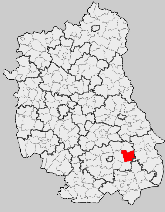 Map of gmina Miączyn, Zamość county, Lublin voivodship Mapa gminy Miączyn, powiat zamojski, województwo lubelskie